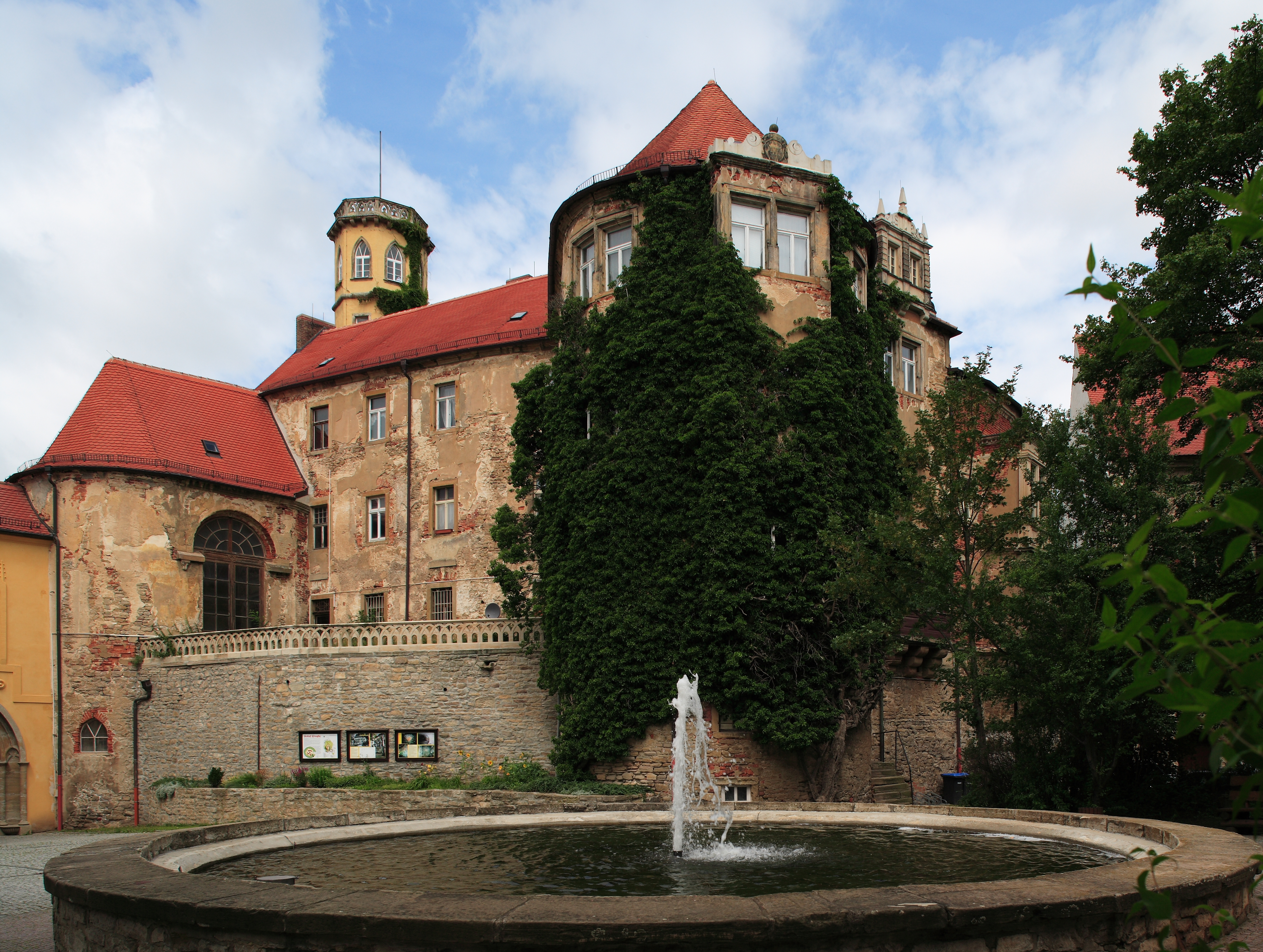 Schloss Droyßig - Frontansicht